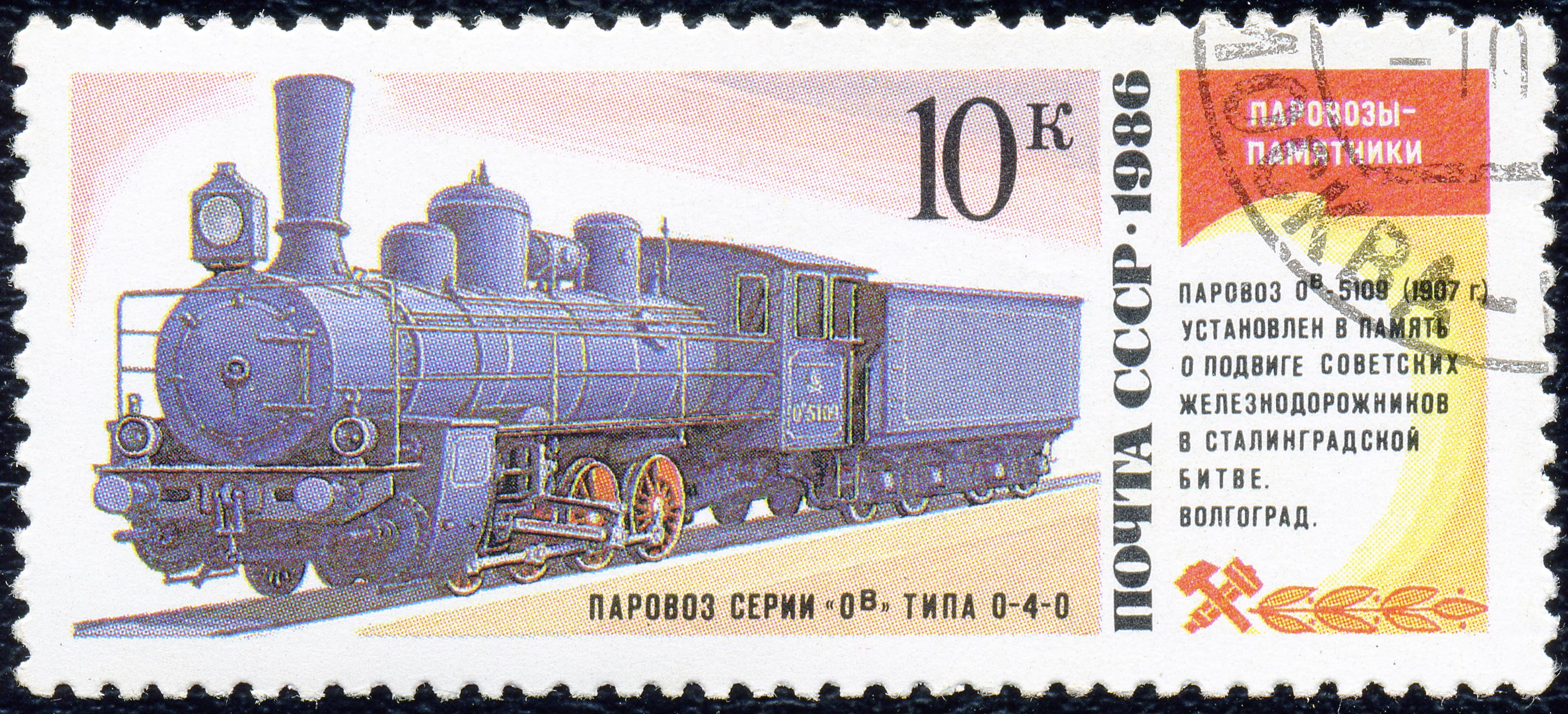 Почтовая марка СССР. 1986. Паровоз серии Ов типа 0-4-0. Волгоград